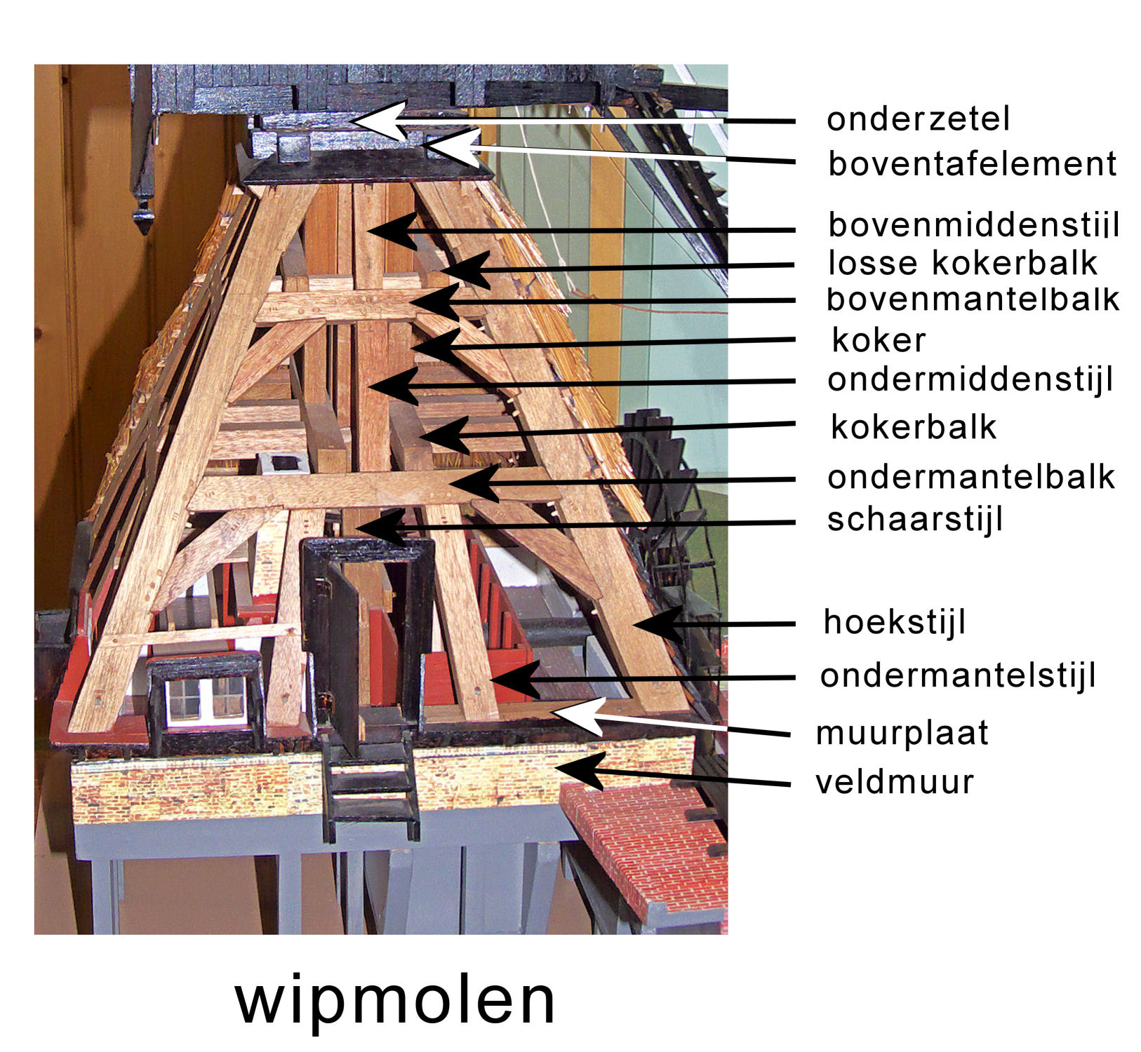 Model van een wipmolen in het molenmuseum van molen De Liefde in Streefkerk met tekst